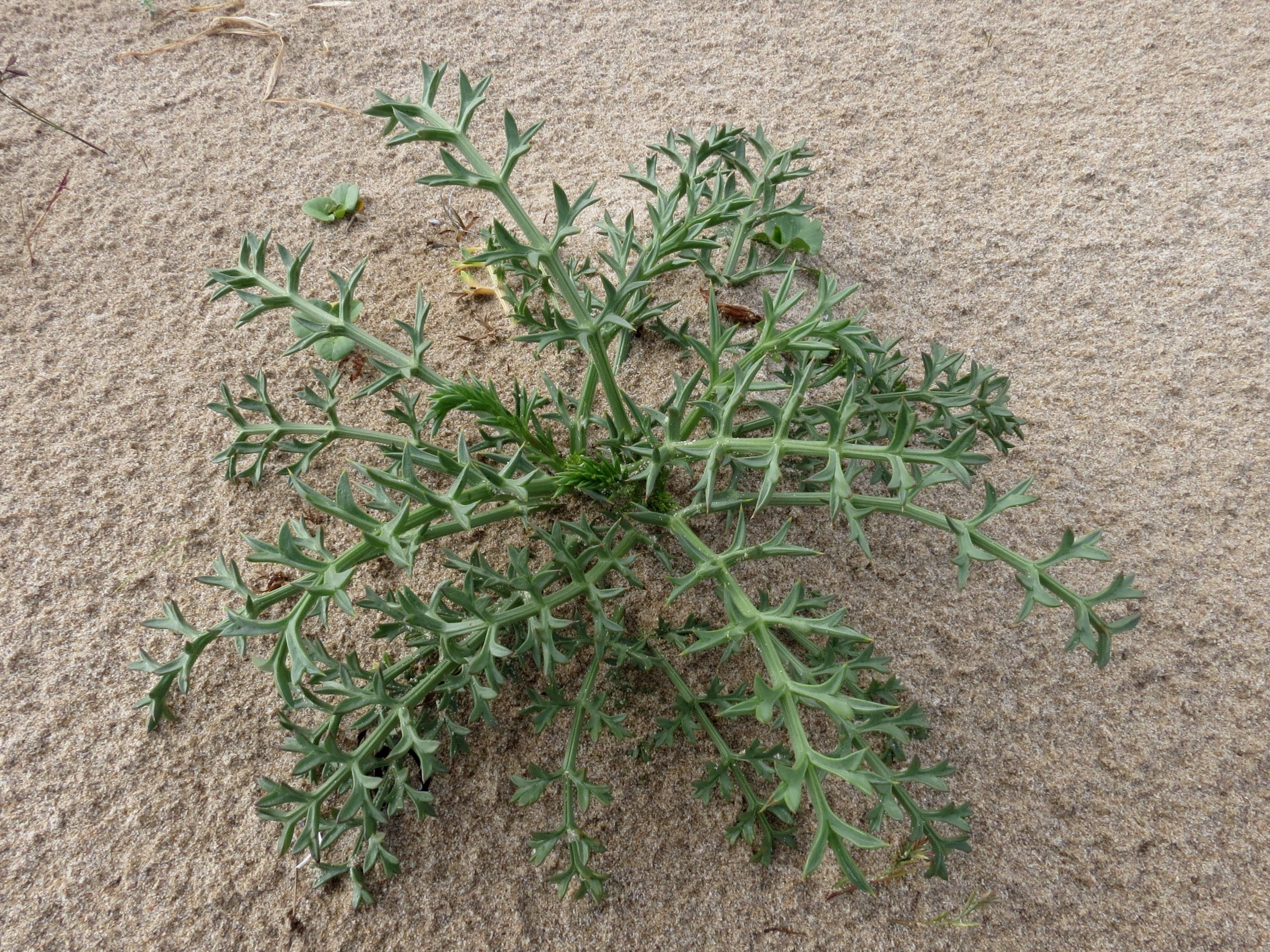 Echinophora spinosa L., 1753, Roda de Barà, Spain, 20 May 2013